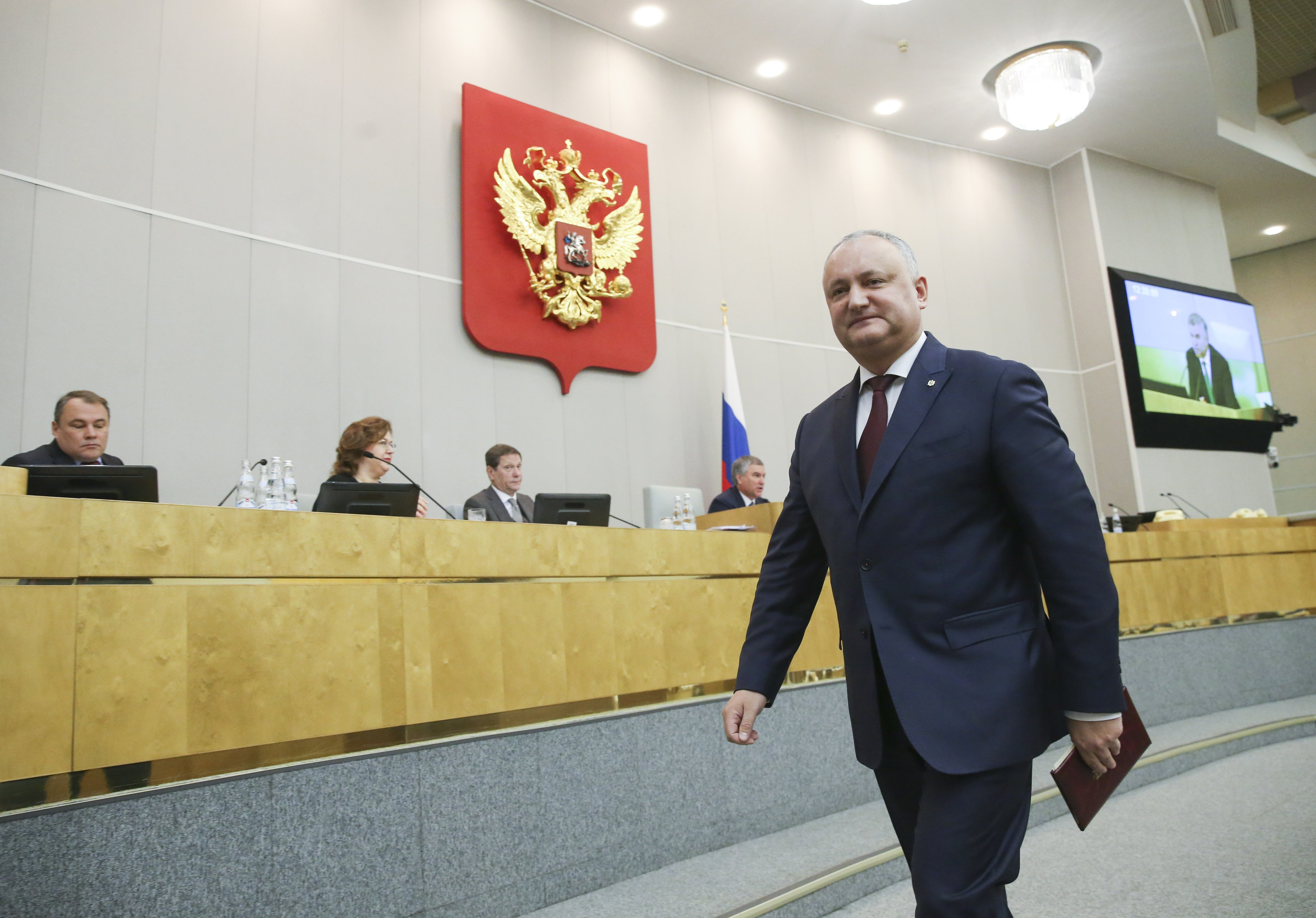 Выступление Президента Республики Молдова Игоря Додона на пленарном заседании Государственной Думы